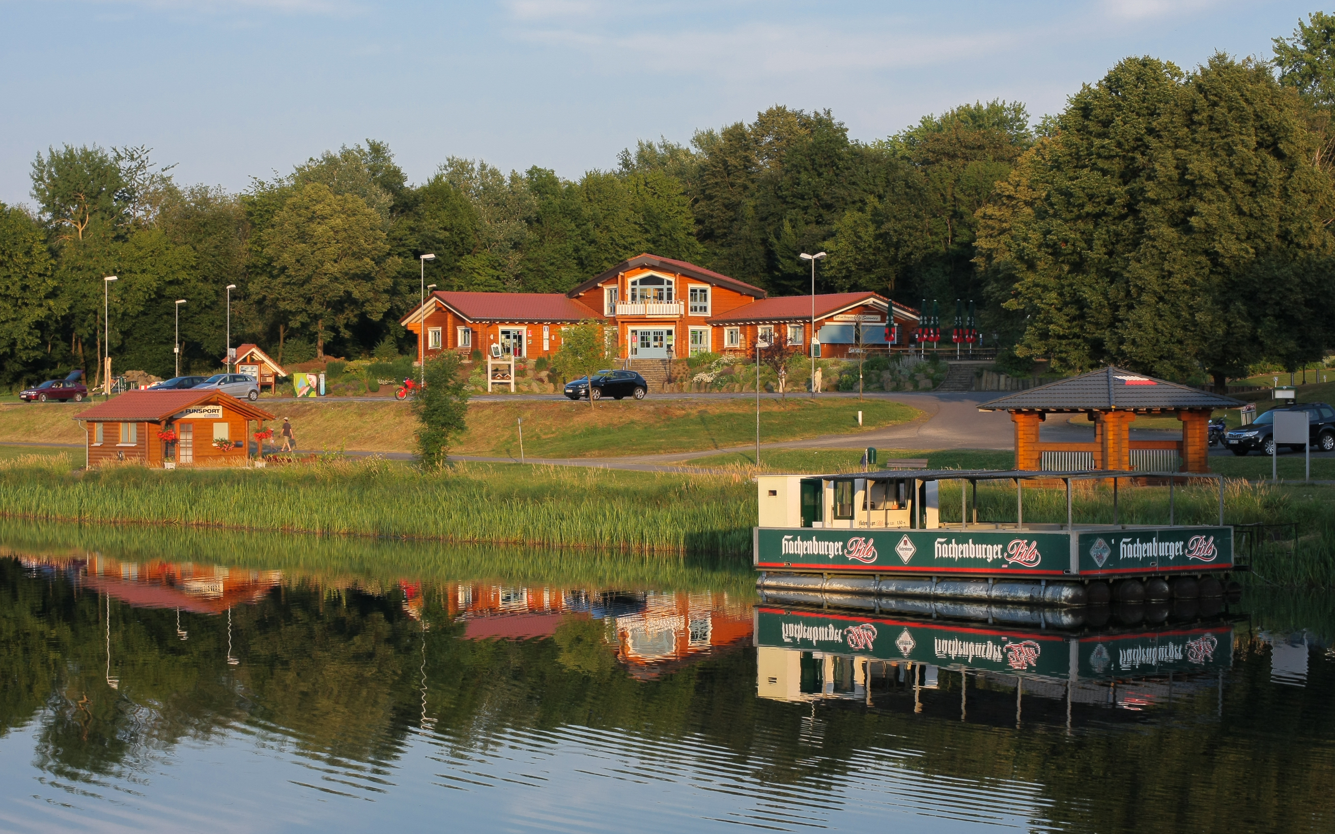 Touristinformation am Wiesensee bei Stahlhofen am WIesensee